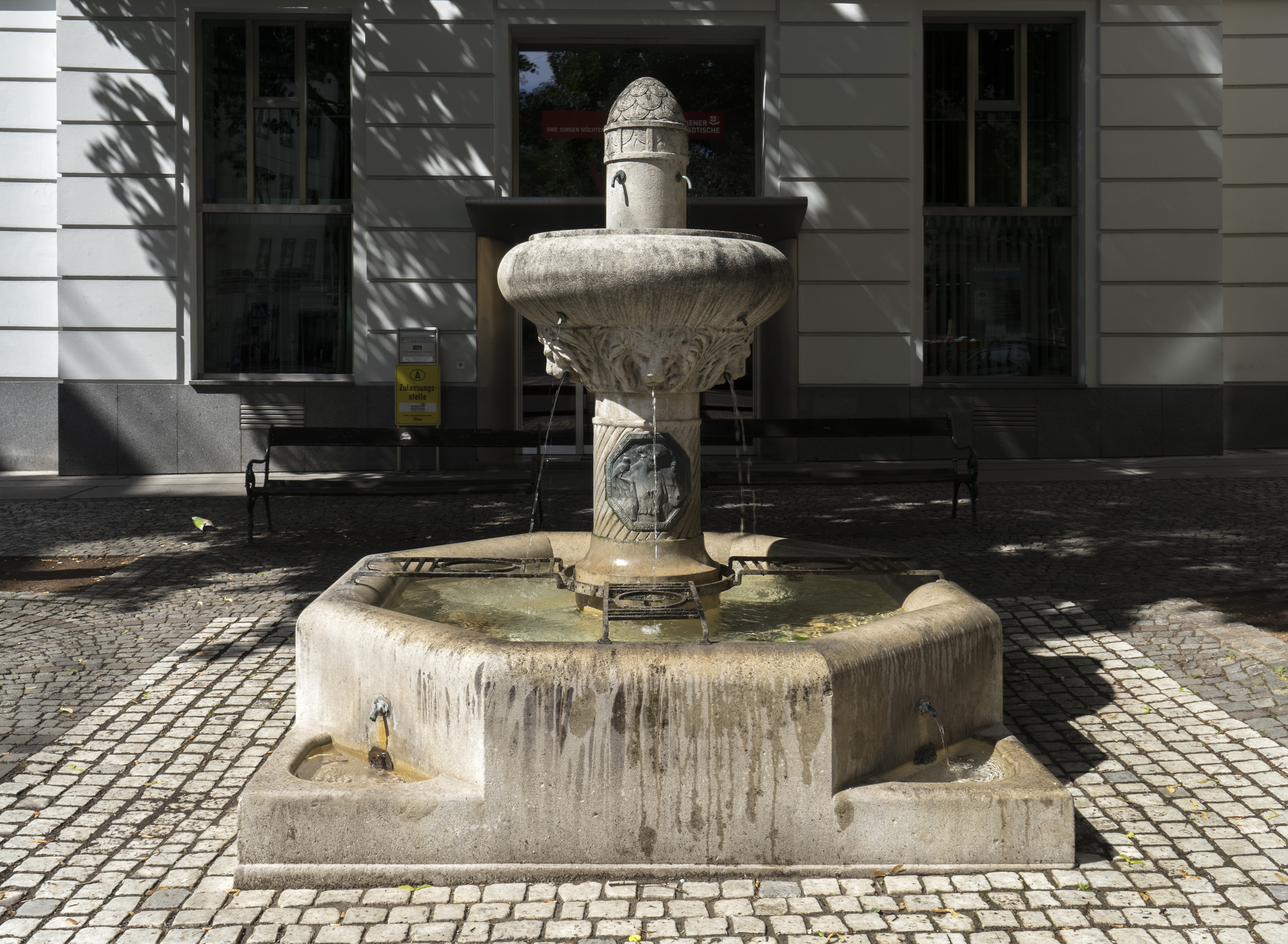 Tiertränkebrunnen, Vienna, Mariahilf